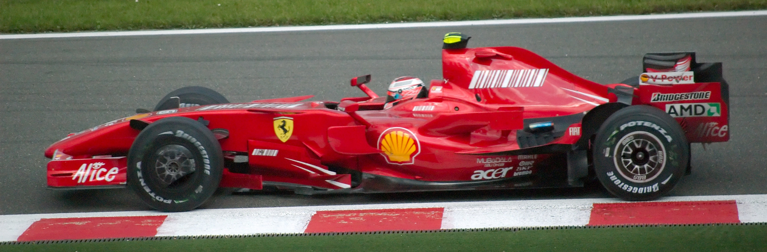 Kimi Raikkonen wins 2007 Belgian GP.